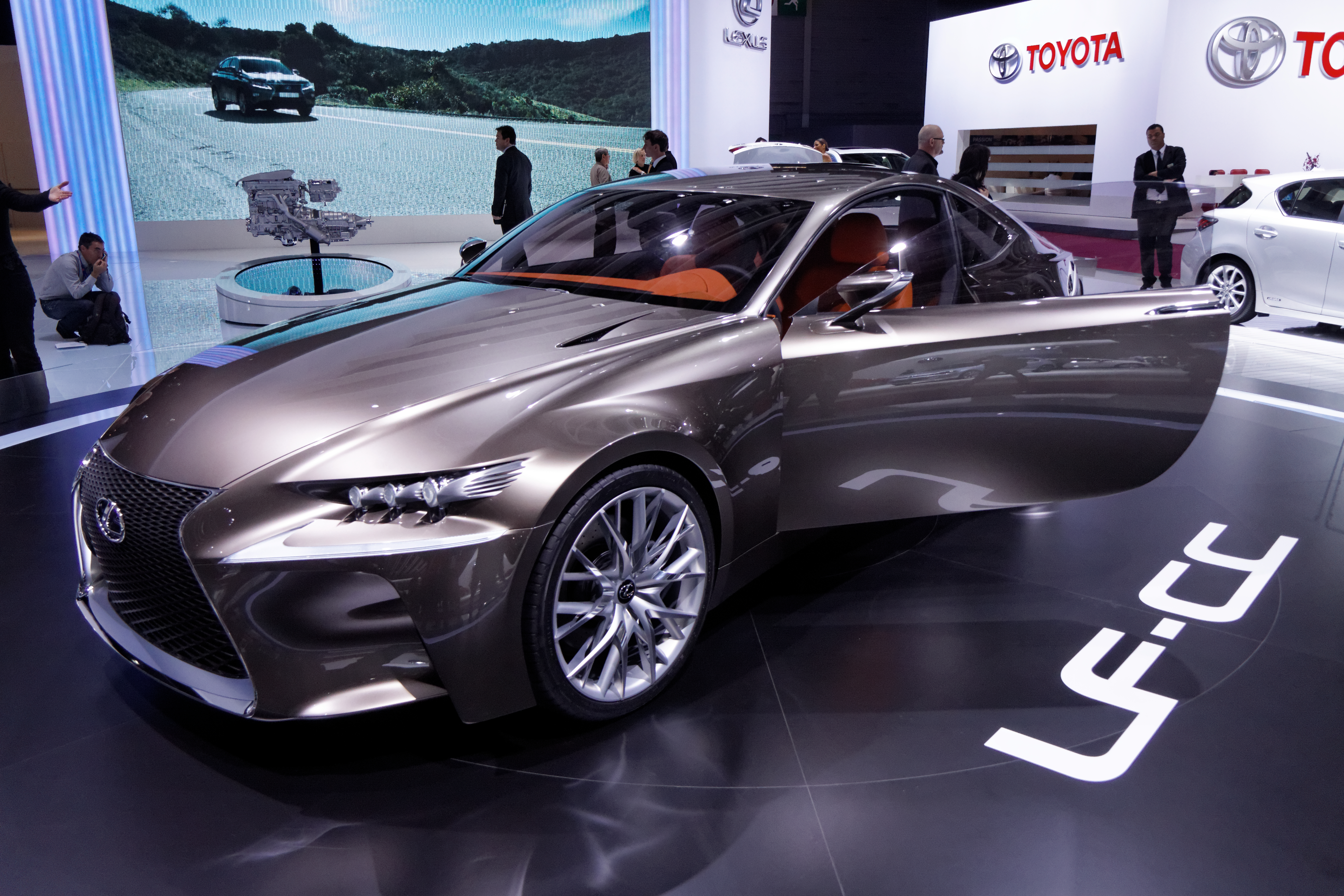 Une Lexus LF-CC présentée lors du Mondial de l'automobile de Paris 2012.